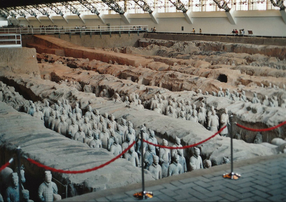 Terrakotta-Armee Xian